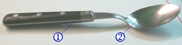 photo perso; mise en domaine public